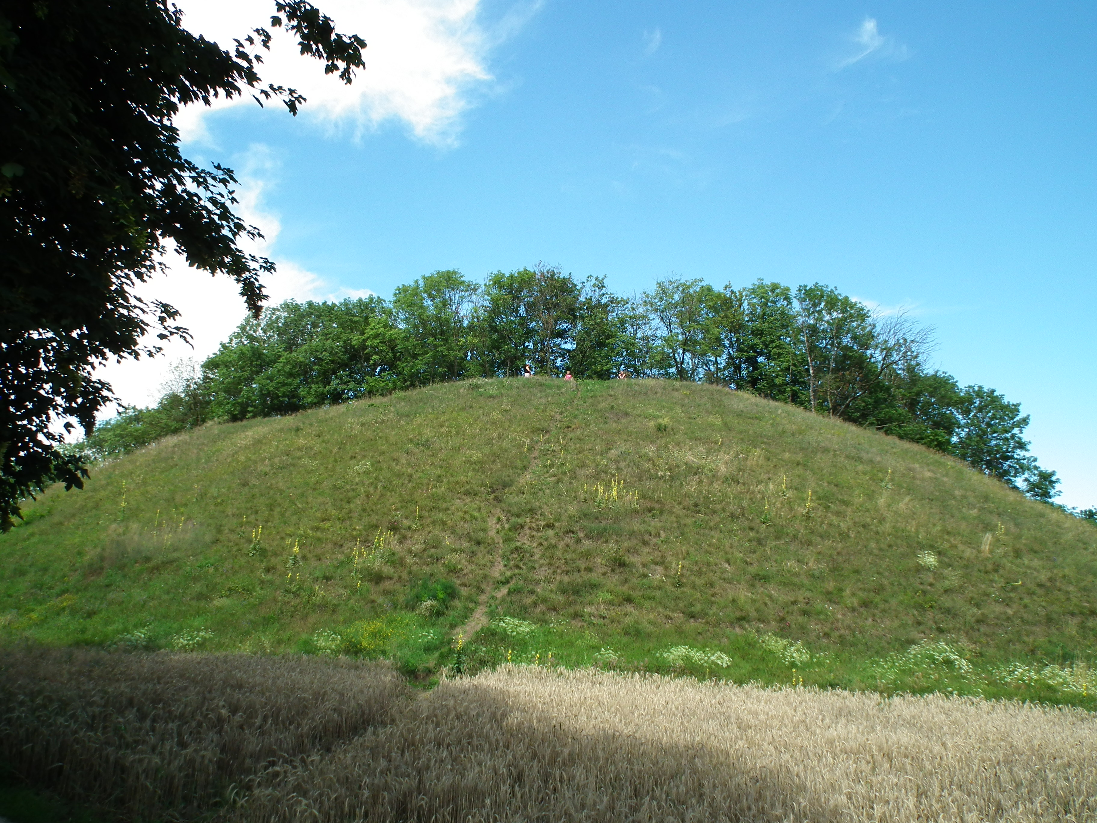 Góra Św. Wawrzyńca pod Chełmnem (grodzisko).